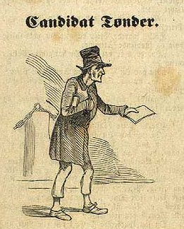 Jens Peter Tønder (1773-1836)